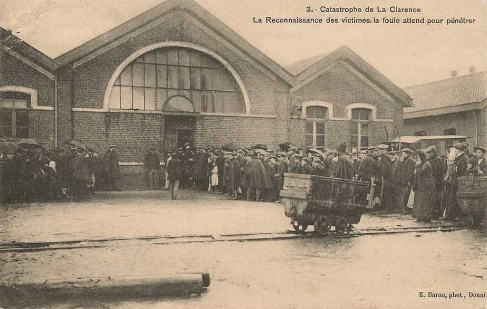 La Fosse n° 1 - 1 bis de la Compagnie des mines de La Clarence était un charbonnage constitué de deux puits situé à Divion, Pas-de-Calais, Nord-Pas-de-Calais, France. Catastrophe du 3 septembre 1912.